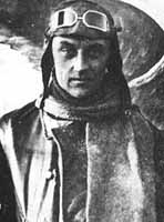 Frank Linke-Crawford osztrák-magyar pilóta